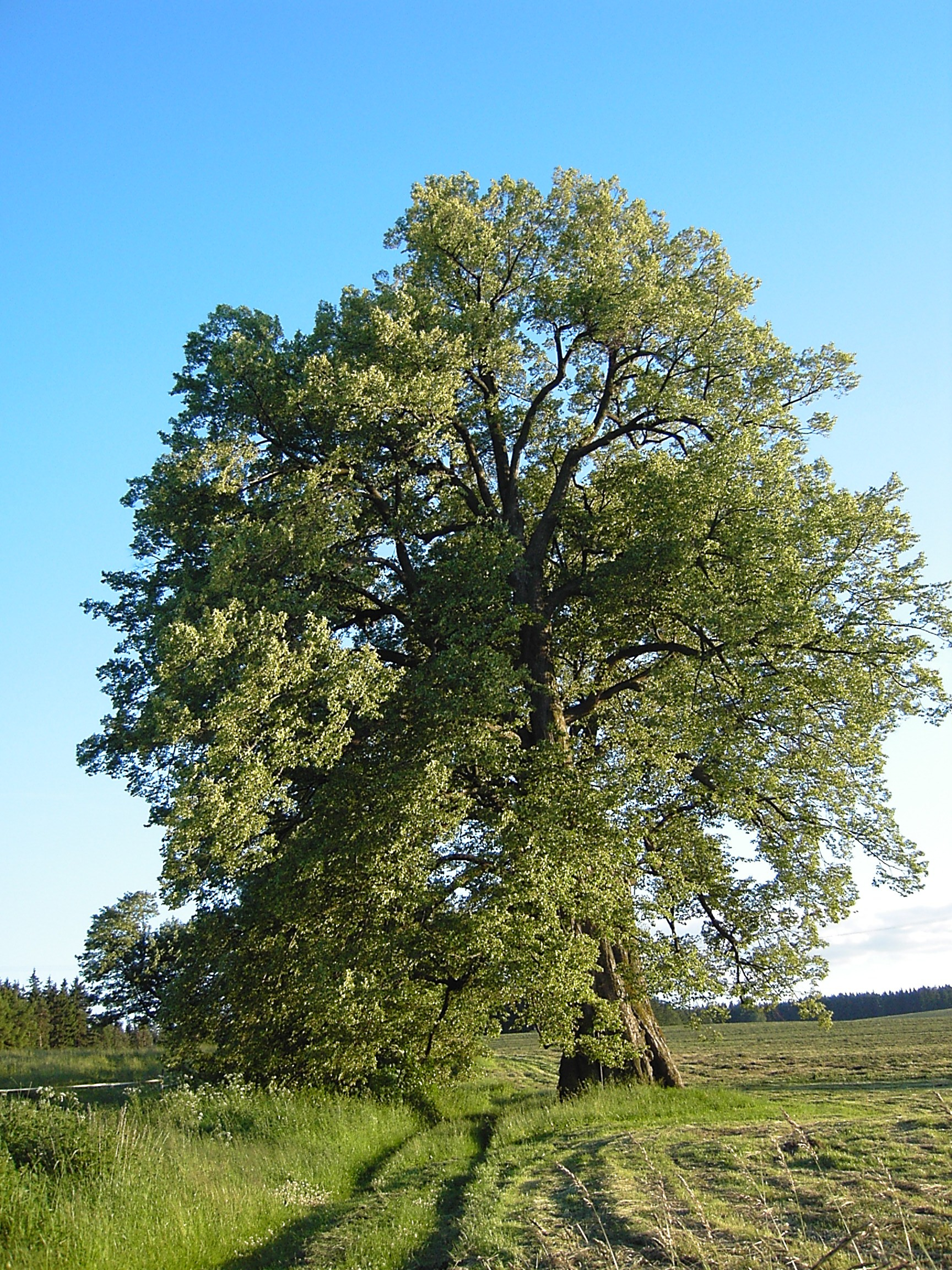 Přes 600 let stará lípa v obci Lipka u Horního Bradla